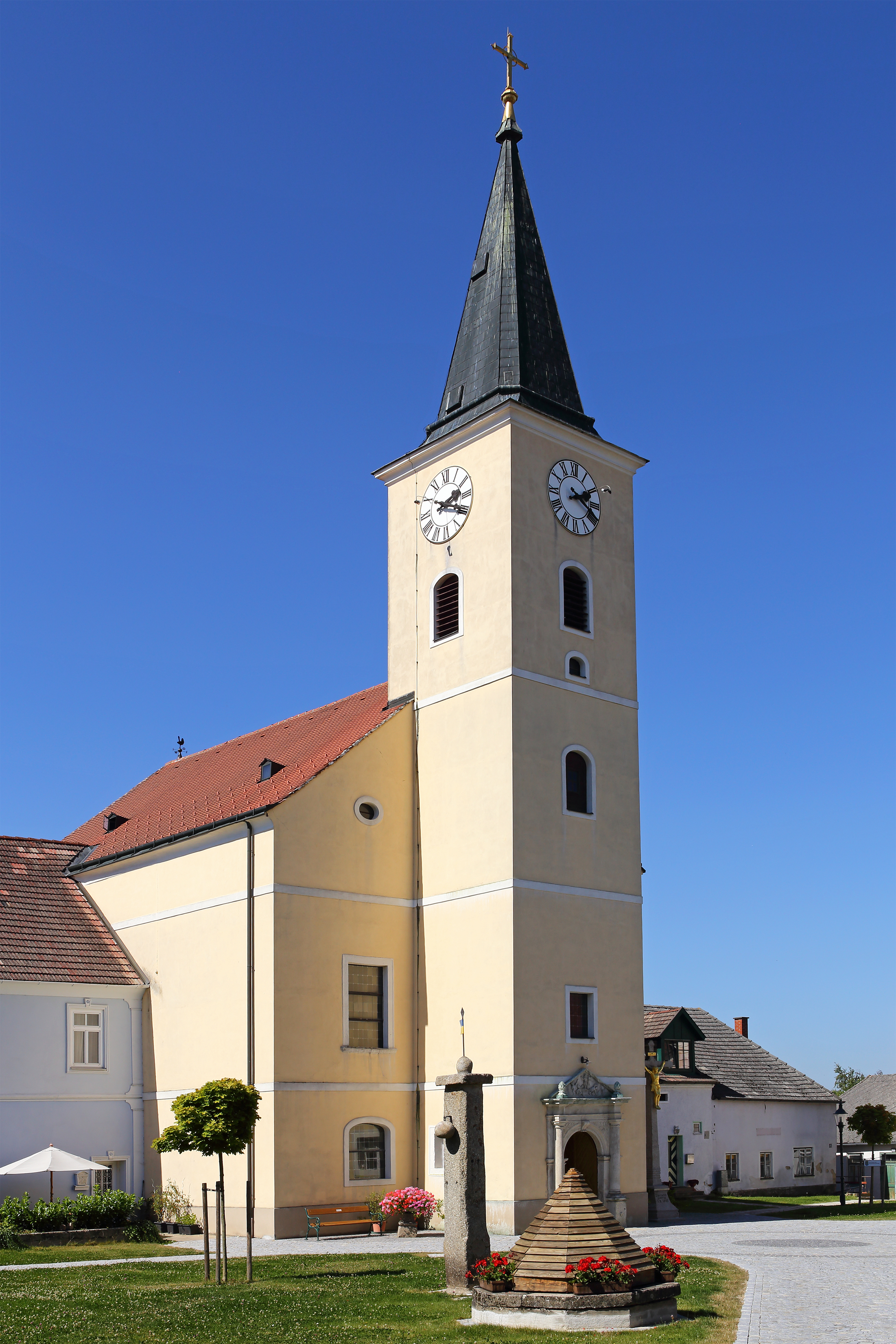 Kath. Pfarrkirche Kreuzerhöhung in Hirschbach. Im Vordergrund: Der ebenfalls unter Denkmalschutz stehende Pranger